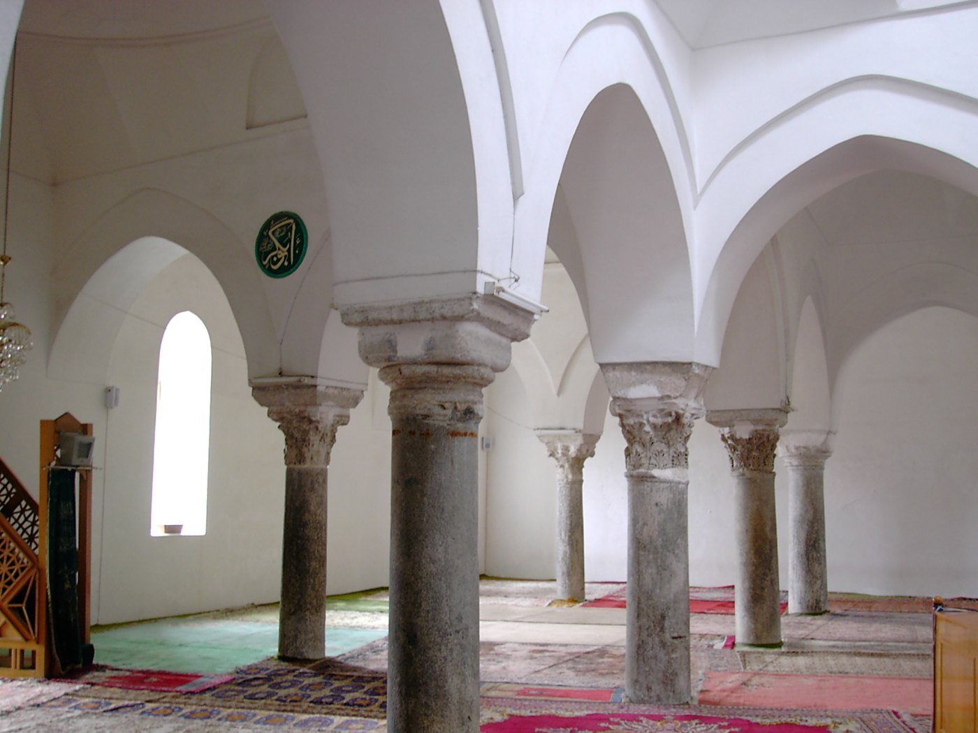 Yivli-Minare-Moschee in antalya von innen